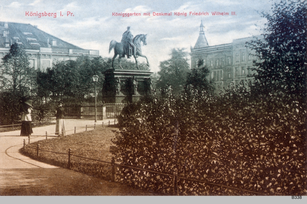 Königsberg